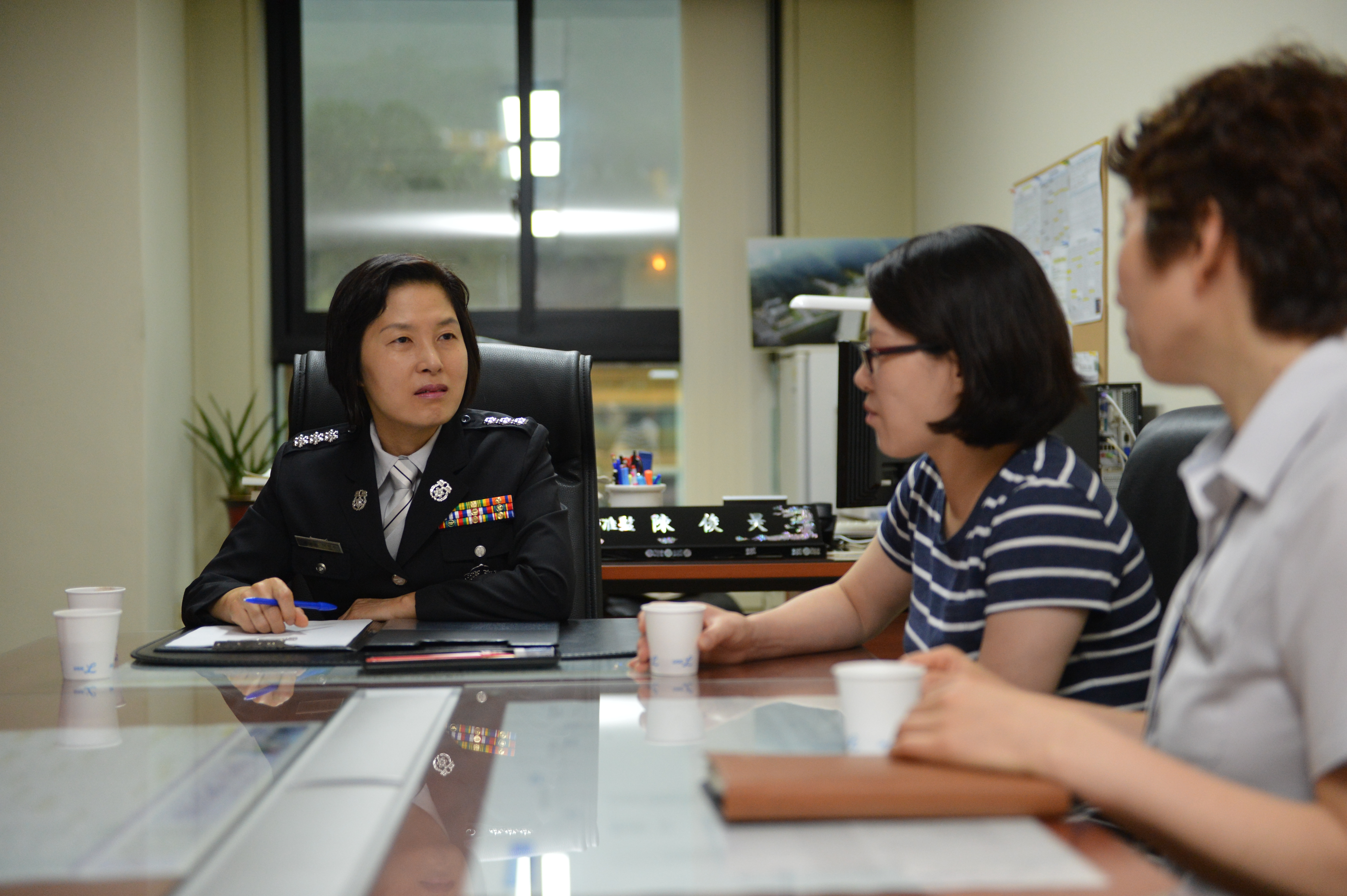 이원주소방공무원Photos of Seoul Metropolitan Fire & Disaster Headquarters